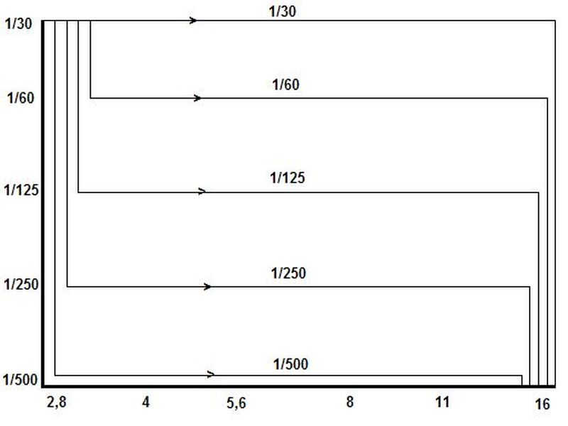 График работы фотоаппарата СОКОЛ в автоматическом режиме